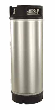 Fat for lagring av øl